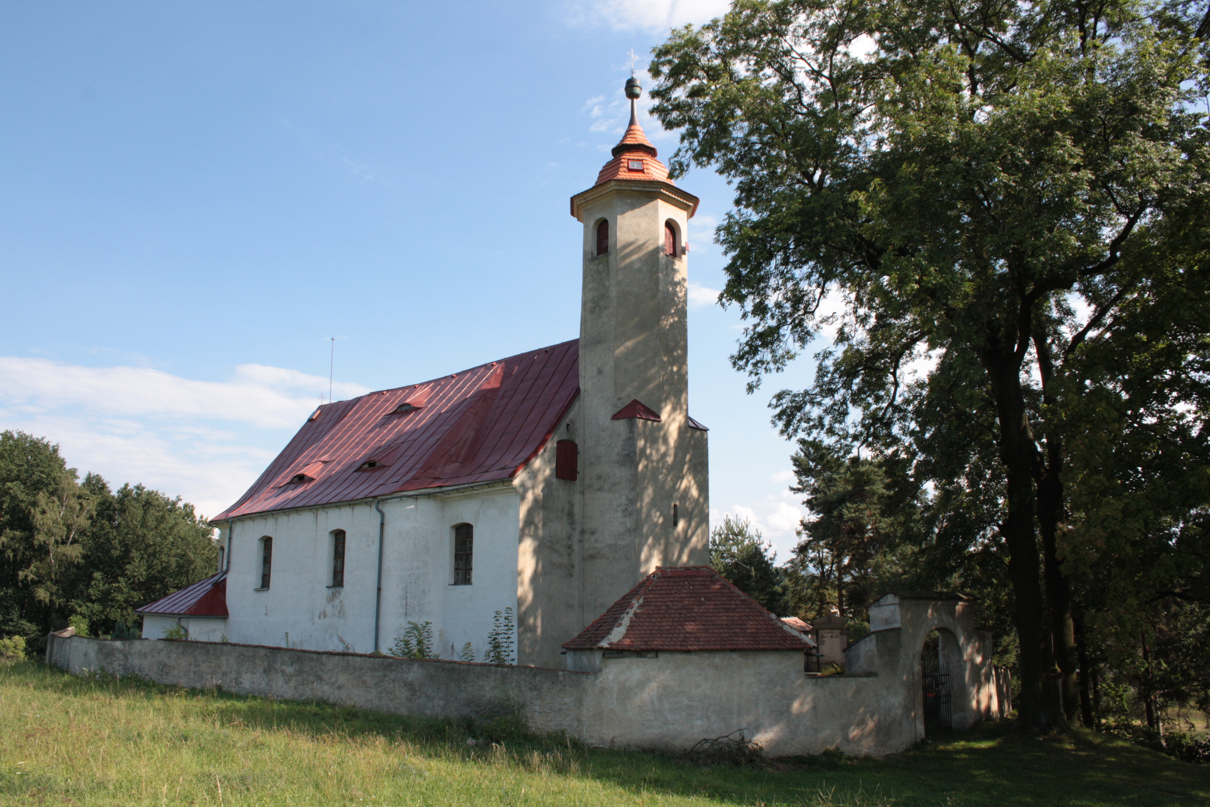 Kostel v Arnolticích u Bulovky.